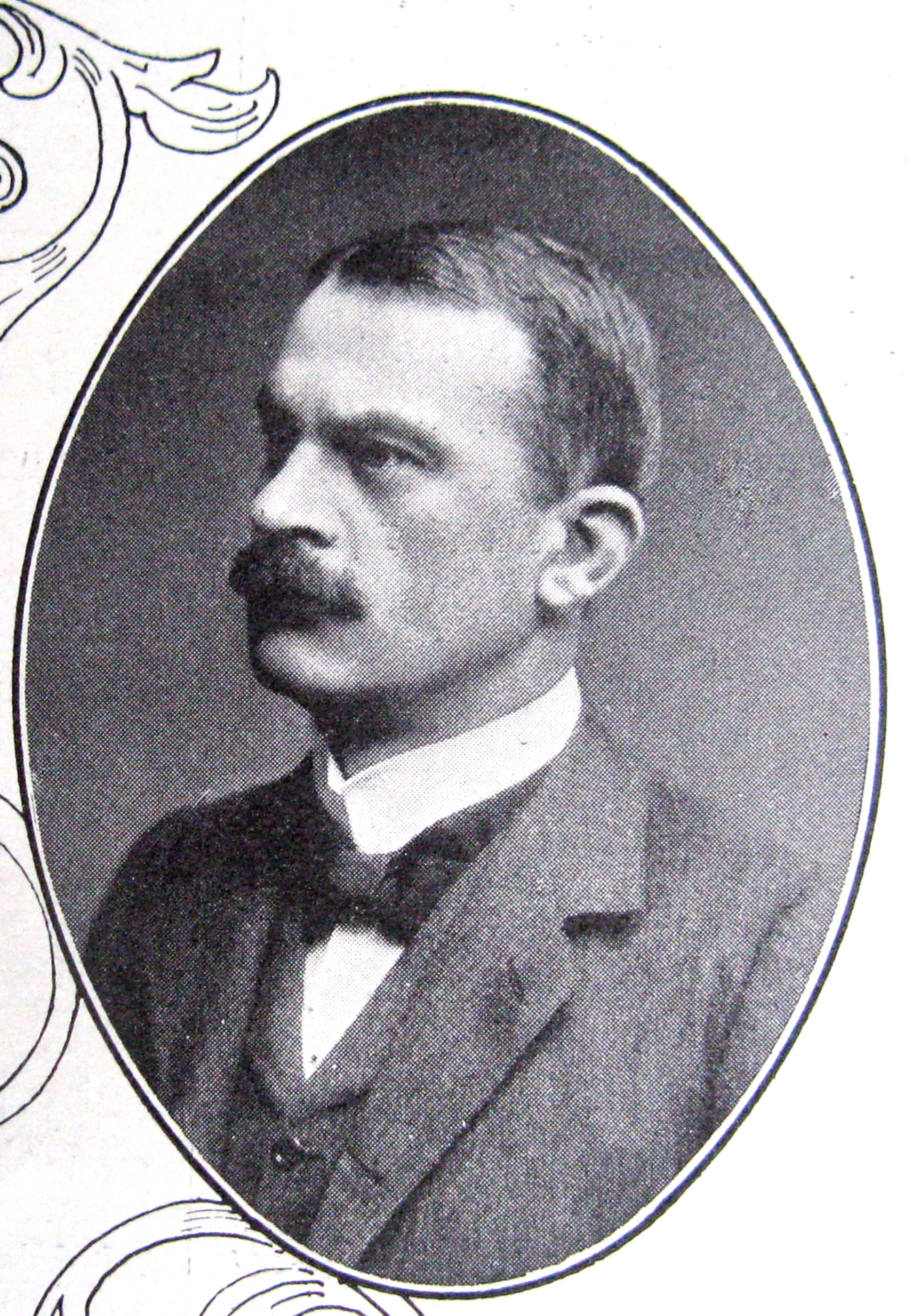 Charles Brun (16. februar 1866 i København - 28. januar 1919) var en dansk politiker, amtmand, kammerherre og finansminister i Ministeriet Neergaard I 1908-1909